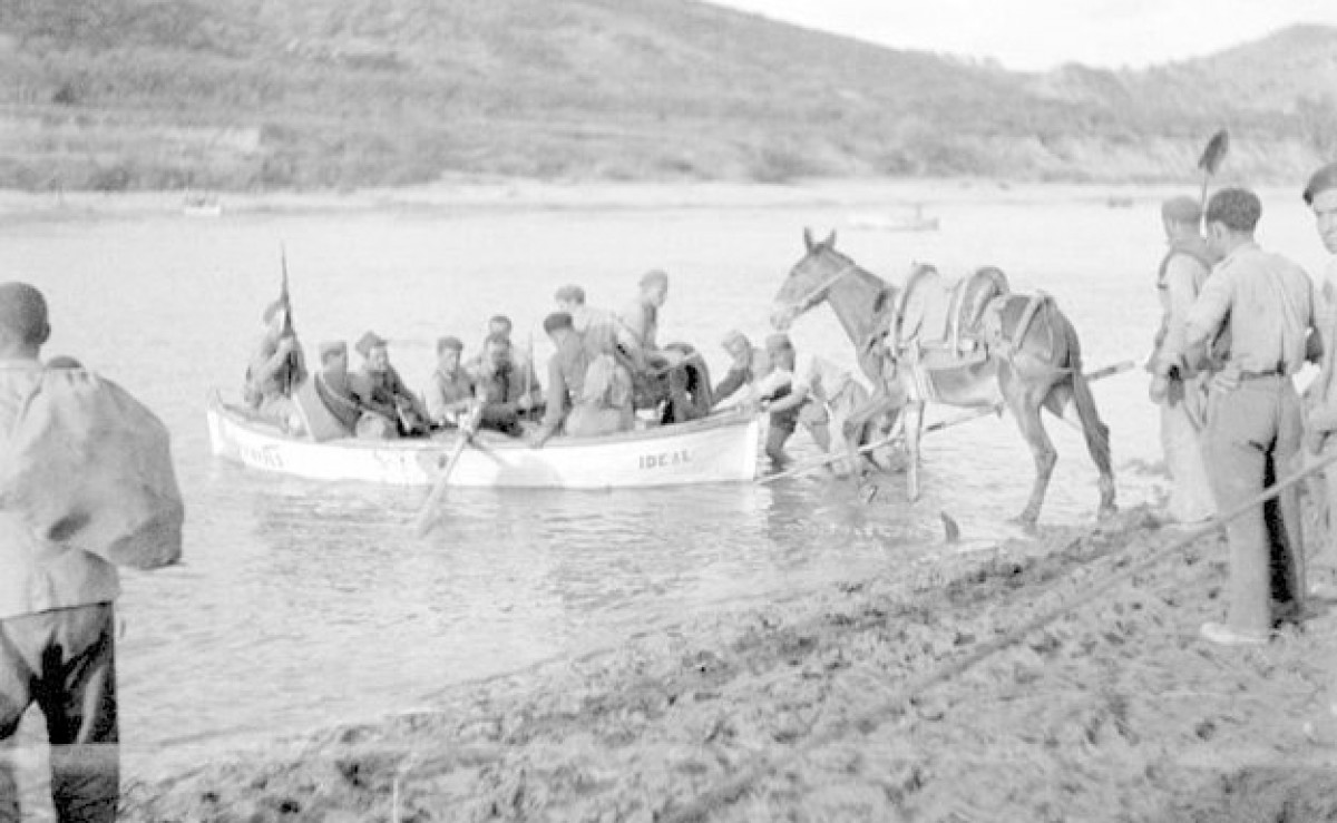 Cruce del Ebro